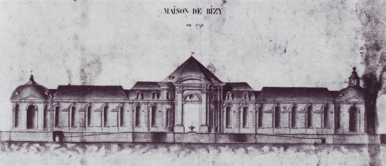 Zeichnung des Schlosses Bizy in Vernon, Eure, im Jahr 1793